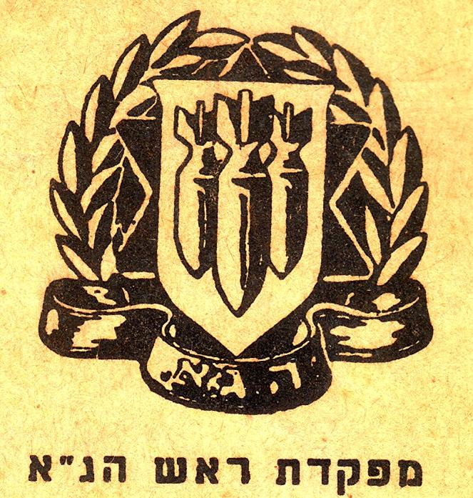 סמל הג"א, הגנה אזרחית